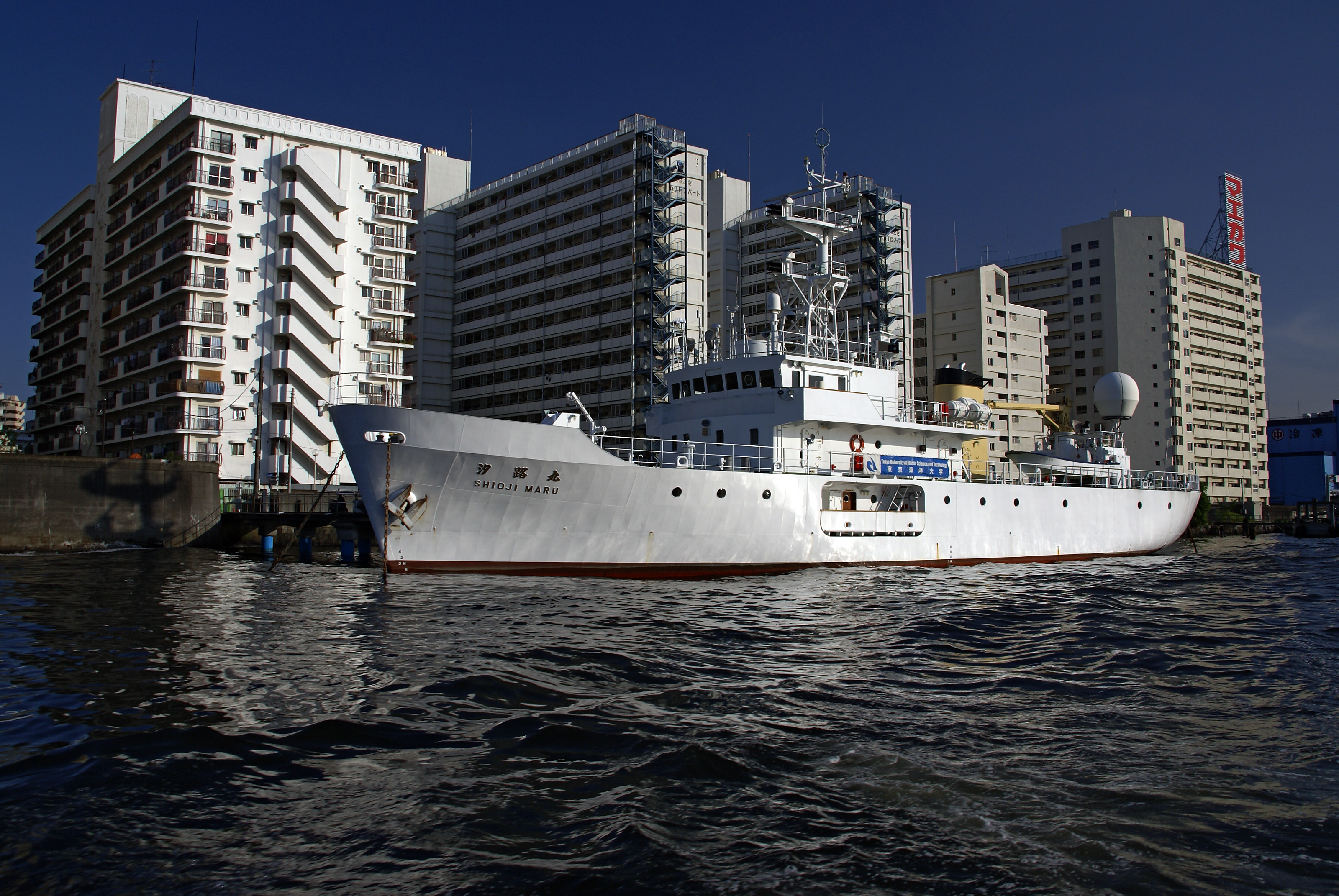 Shioji-maru at Sumida River in Chuo-ku, Tokyo, Japan